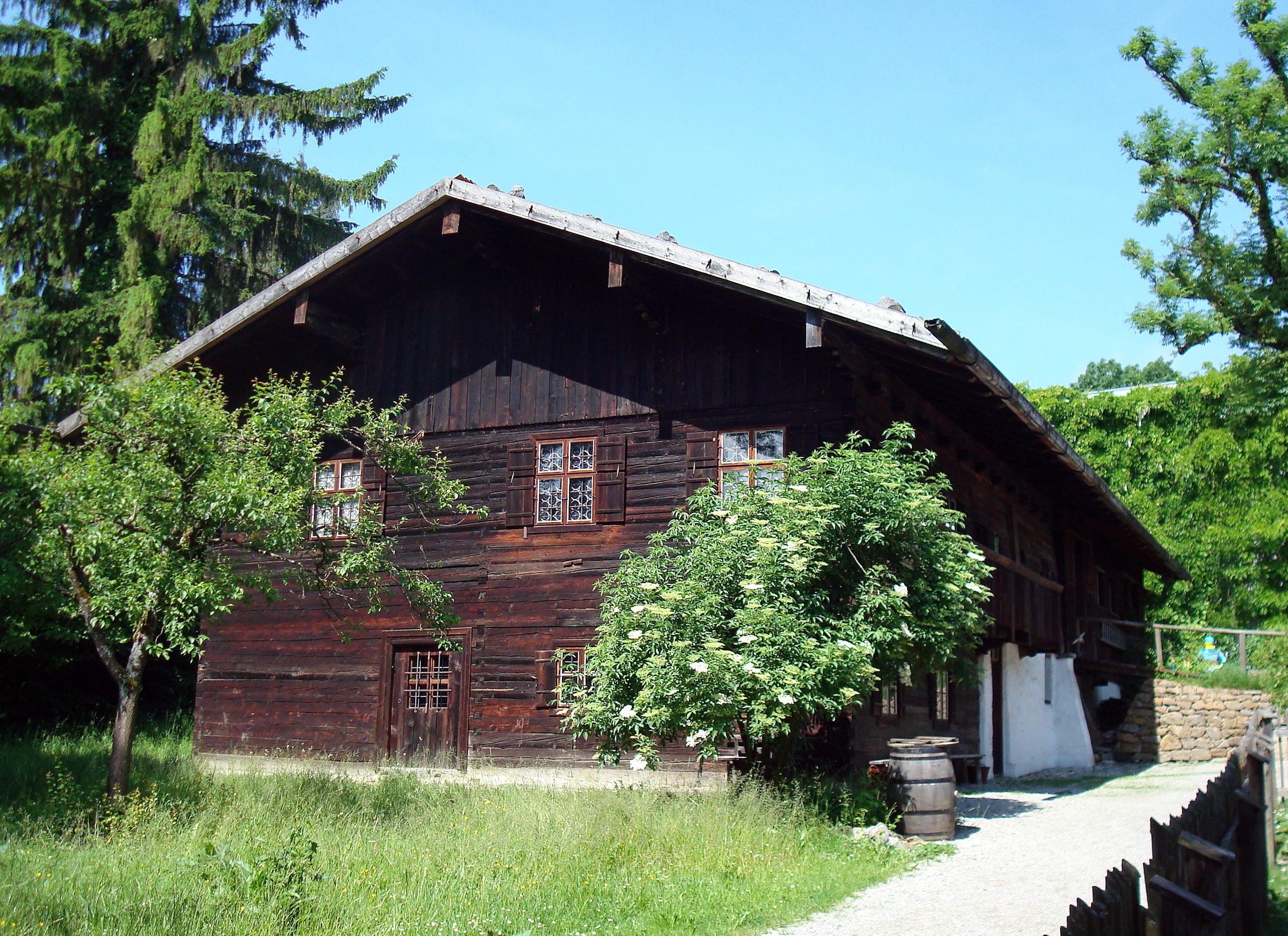 Starnberg, Possenhofener Straße 5a, Museumsgebäude. Im 'Lochmannhaus', einem 1693 erbauten Bauernhaus mit ehemaligem Herrensitz im Obergeschoss, wurde 1914 ein Heimatmuseum eröffnet. Heute ist es Teil des Museums Starnberger See. Neben sakralen Skulpturen beherbergt es Sammlungen, die in das Alltagsleben der bäuerlichen Bevölkerung des 18. und 19. Jahrhunderts Einblick gewähren.